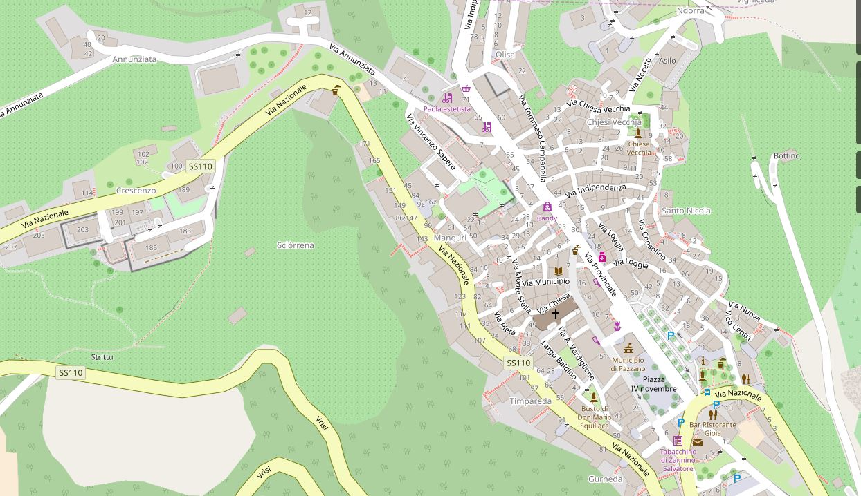 Mappa Dettaglio OSM Centro Abitato OSM dic2017